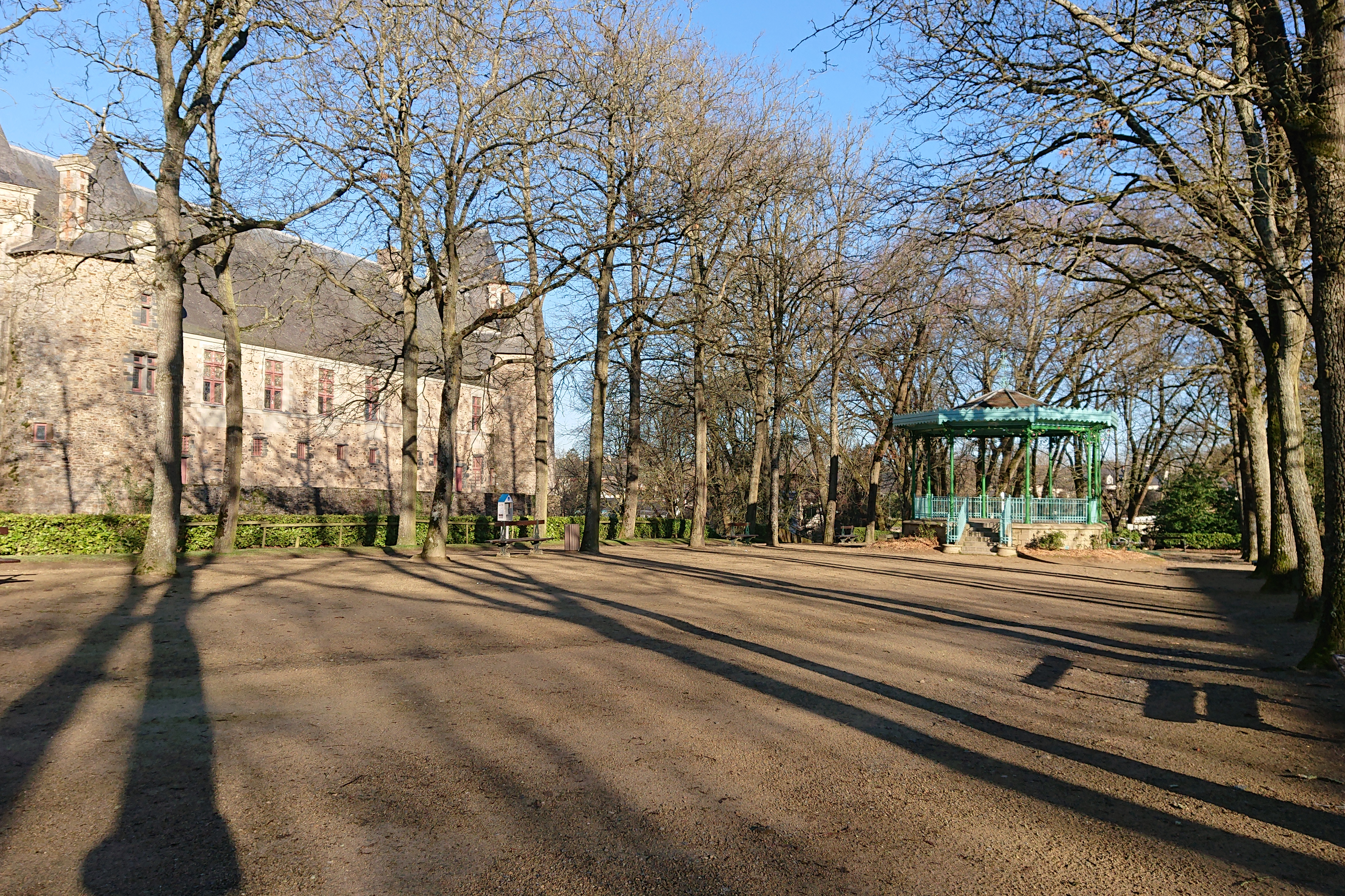 Promenade des Terrasses, Châteaubriant, France.